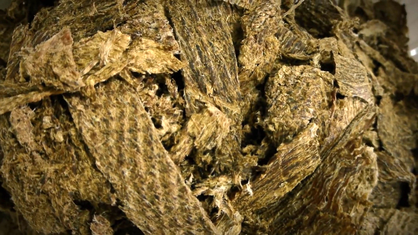 Charqui de carne vacuna